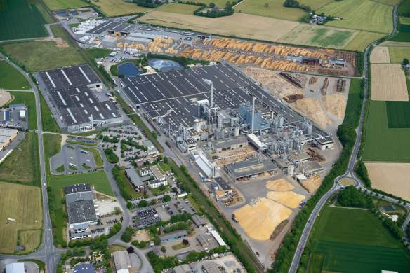 EGGER Holzwerkstoffe Brilon GmbH & C0. KG